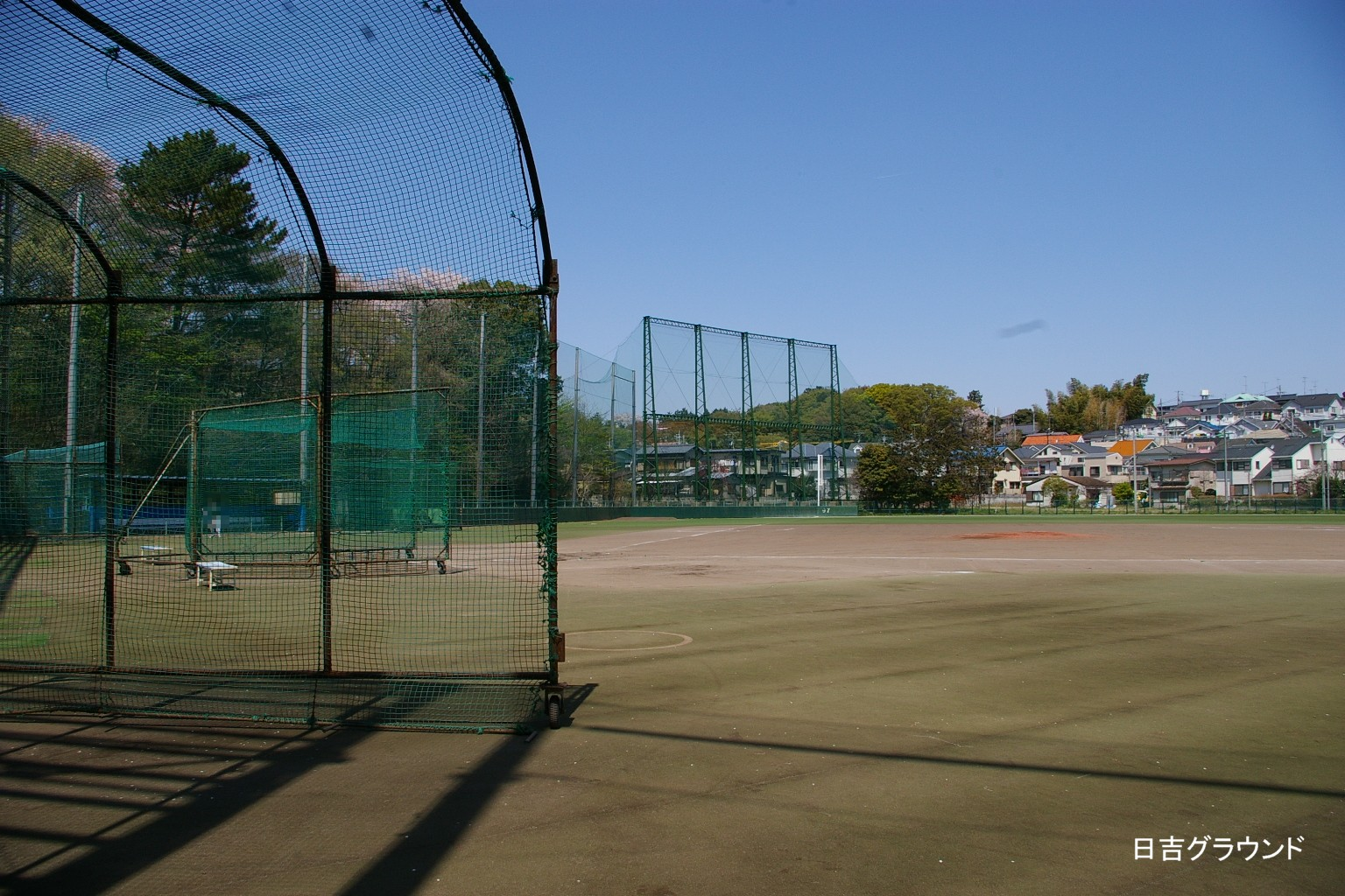 Hiyoshi